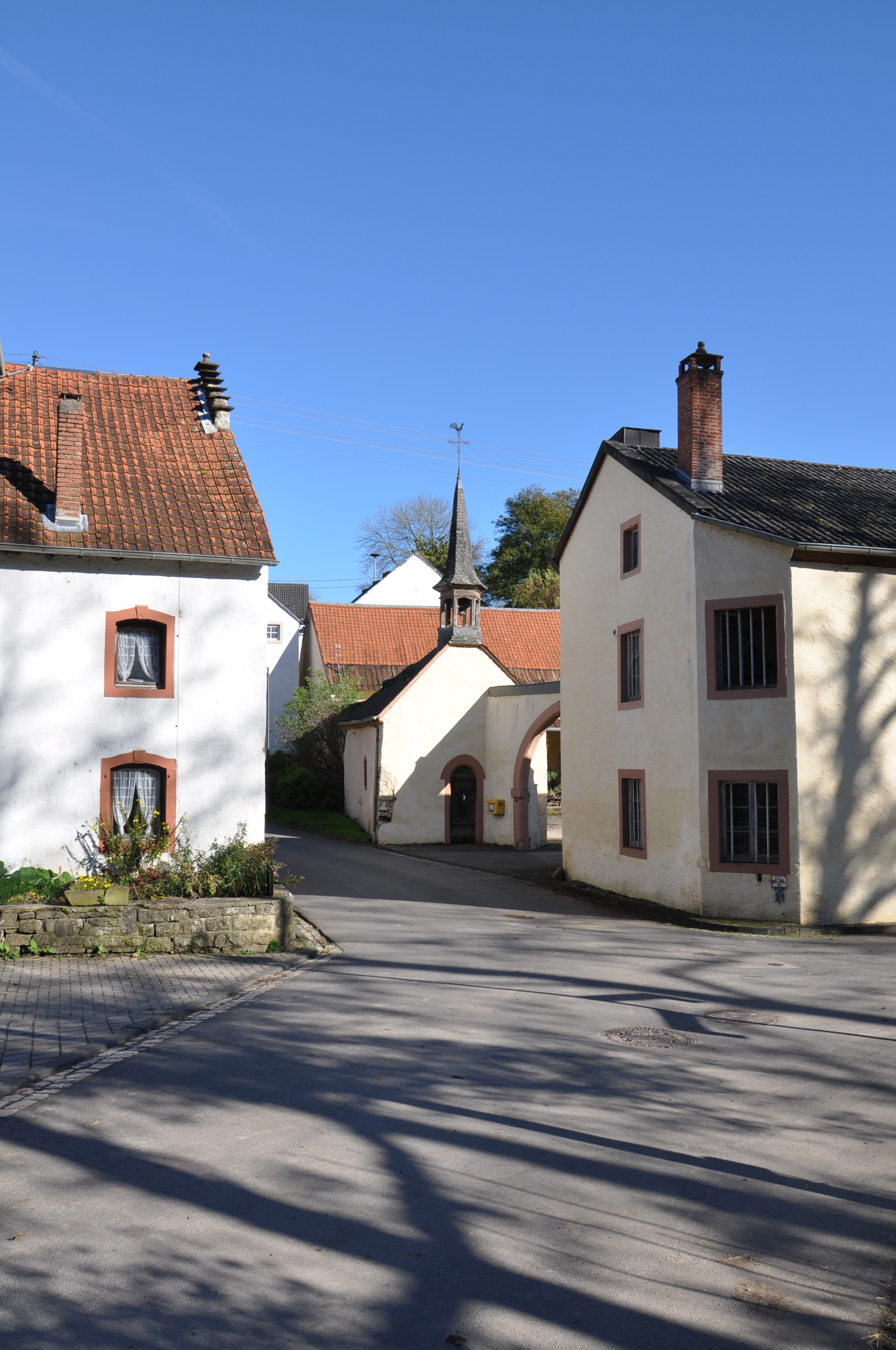 Birtlingen, Ortskern mit Kapelle St. Sebastian